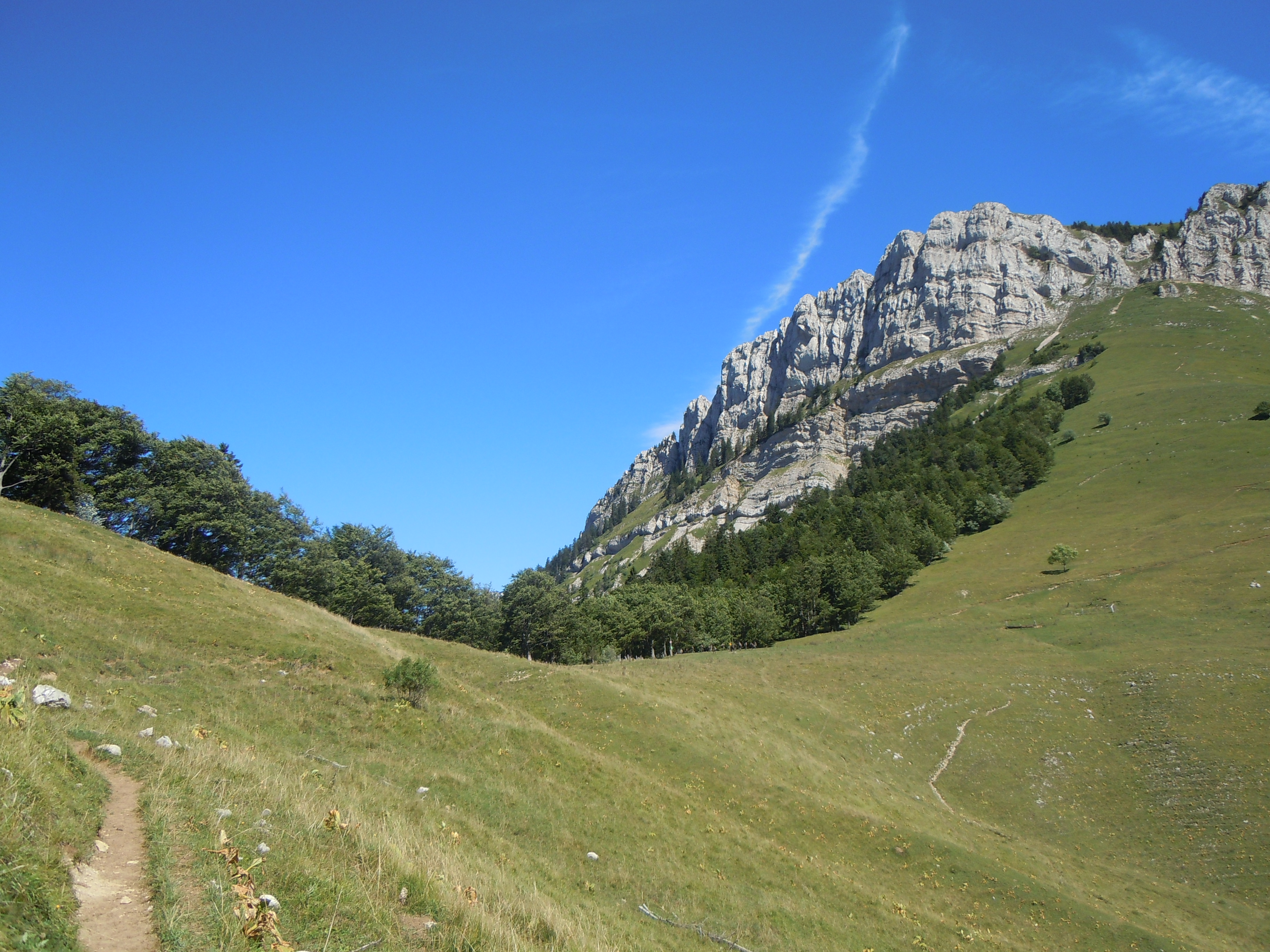 Col de la Ruchère depuis le chemin du Pré de la Folie - Grande Chartreuse - Savoie - France